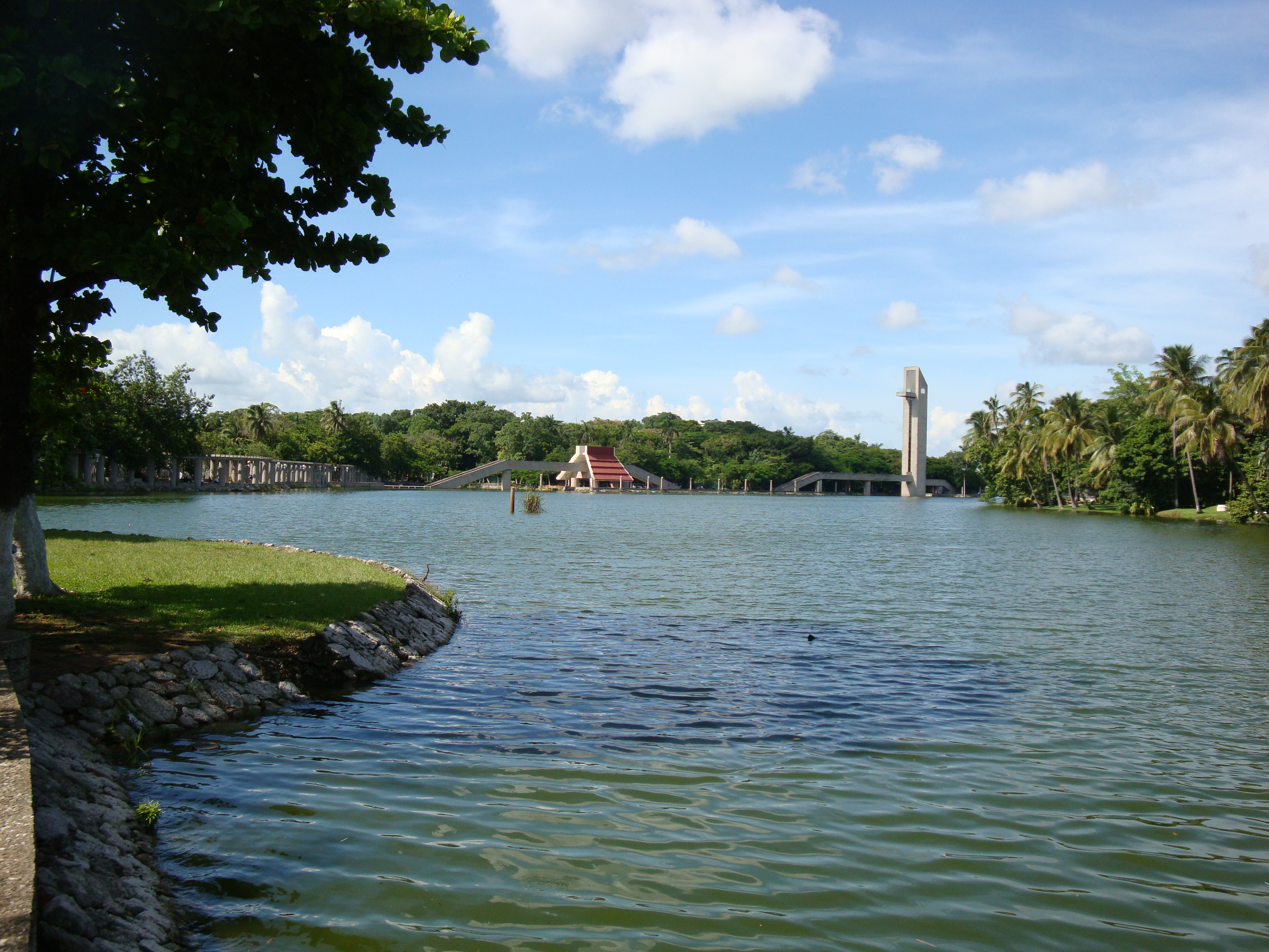 Panorámica de la Laguna de las Ilusiones y el parque Tomás Garrido Canabal, en la que se aprecia el mirador y el malecón del parque, en la ciudad de Villahermosa, estado de Tabasco, México